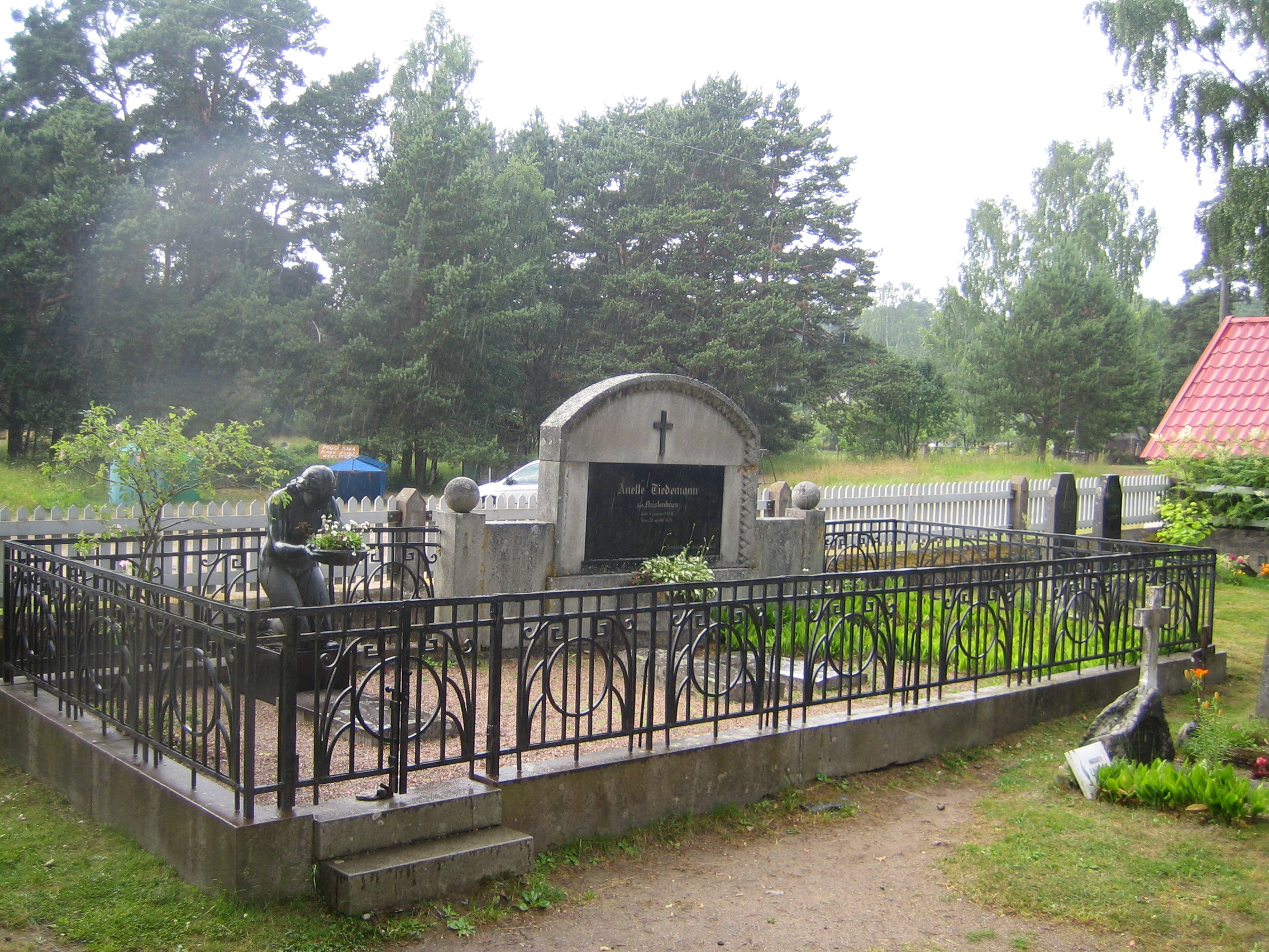 Hauamonument "Põlvitav naine" Käsmu kalmistul (J. Raudsepp 1937)